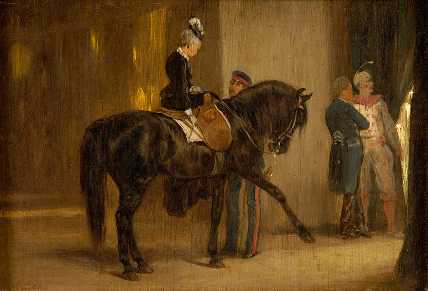 Heinrich Lang (1838-1891): Vor dem Auftritt. Signiert. Öl/Holz, 11,5 x 16,5 cm